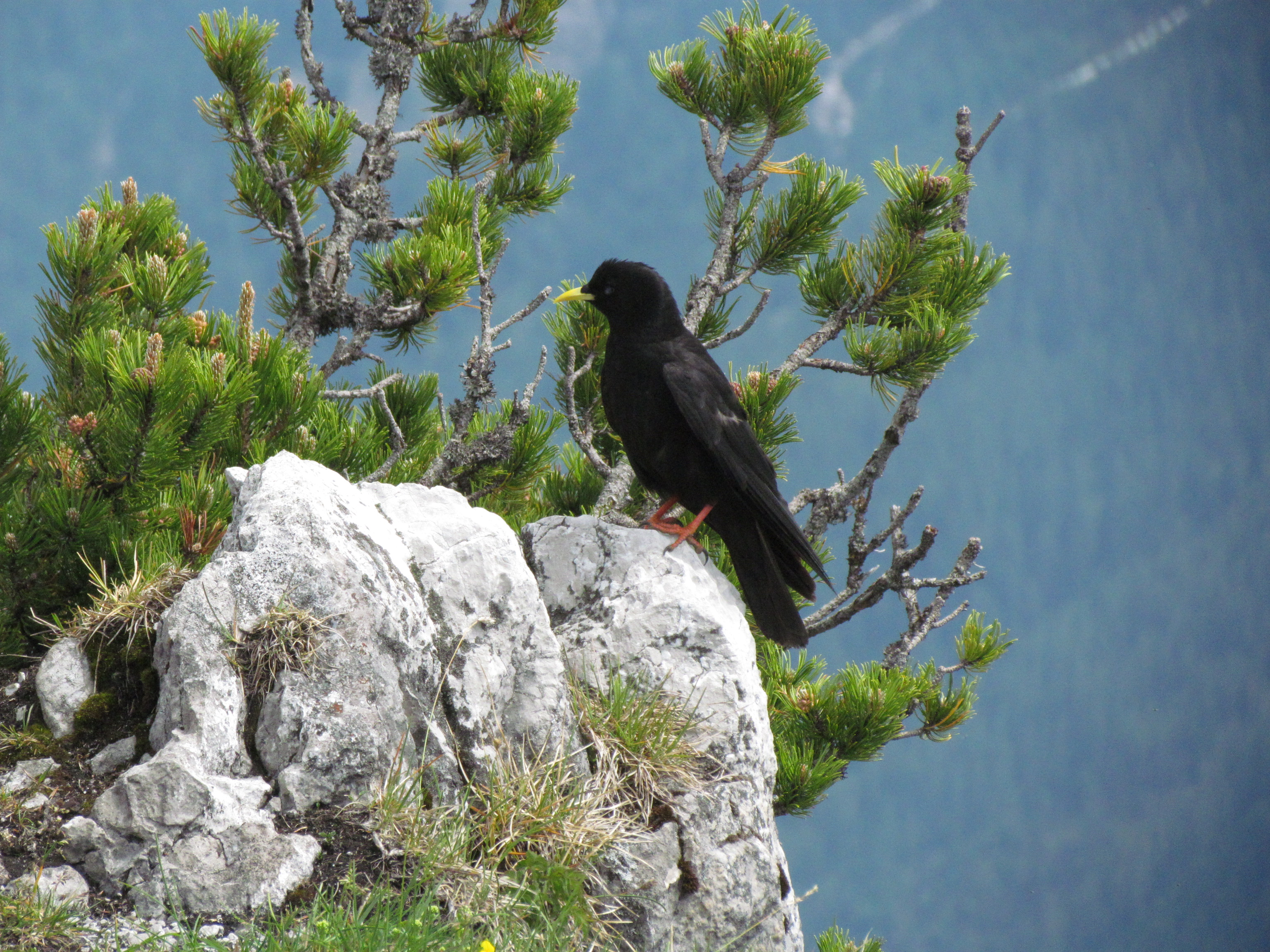 In der Mitte steht die Alpendohle auf dem Felsen.